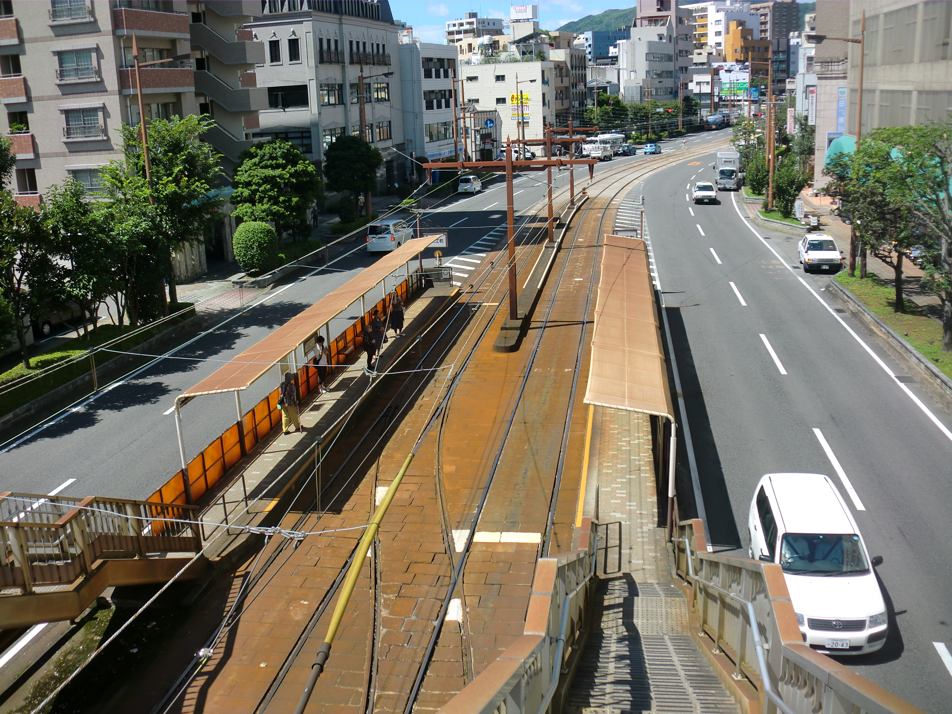 長崎電気軌道新大工町停留場